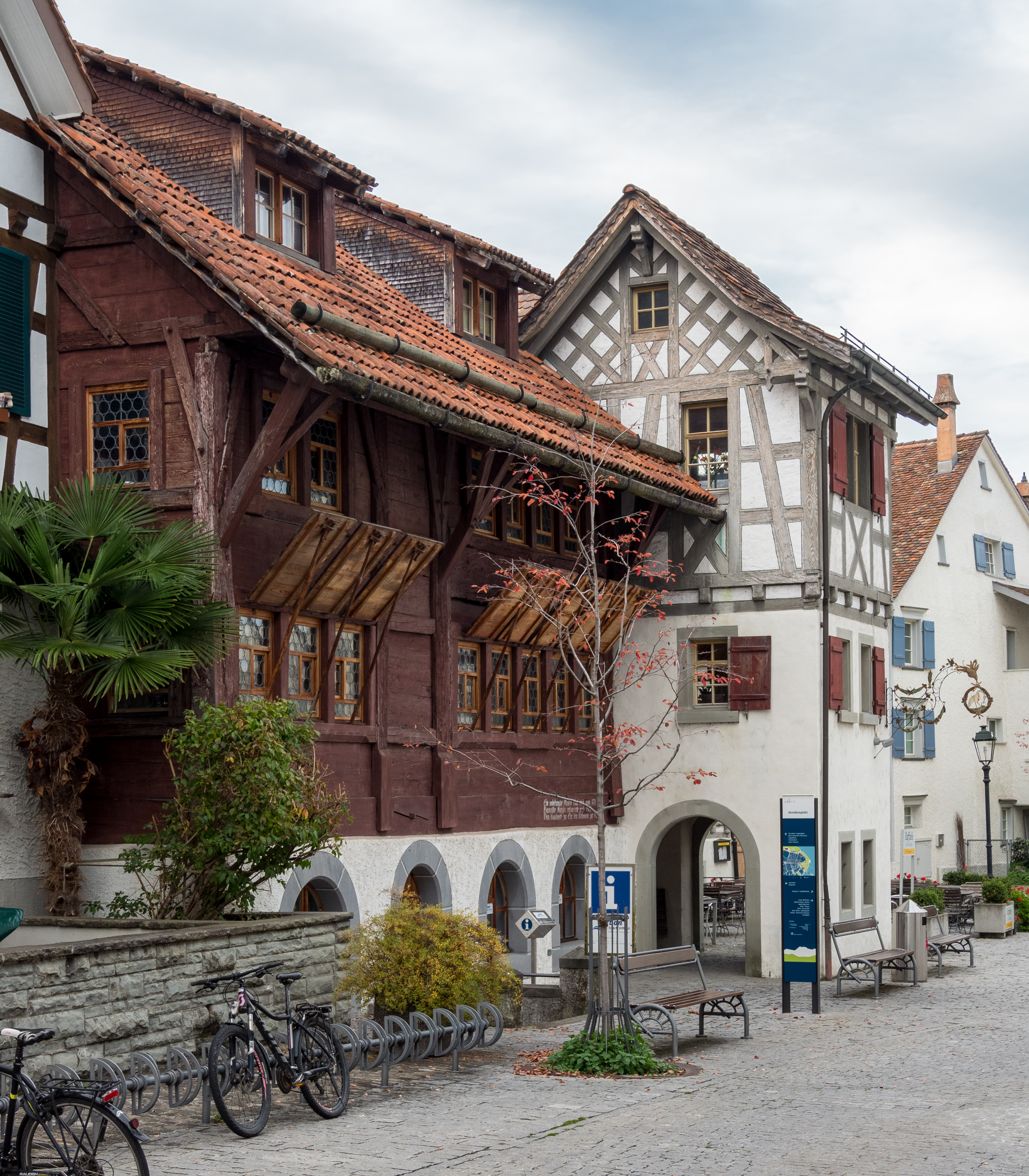 Bohlenständerhaus Schmiedgasse 5 in Arbon